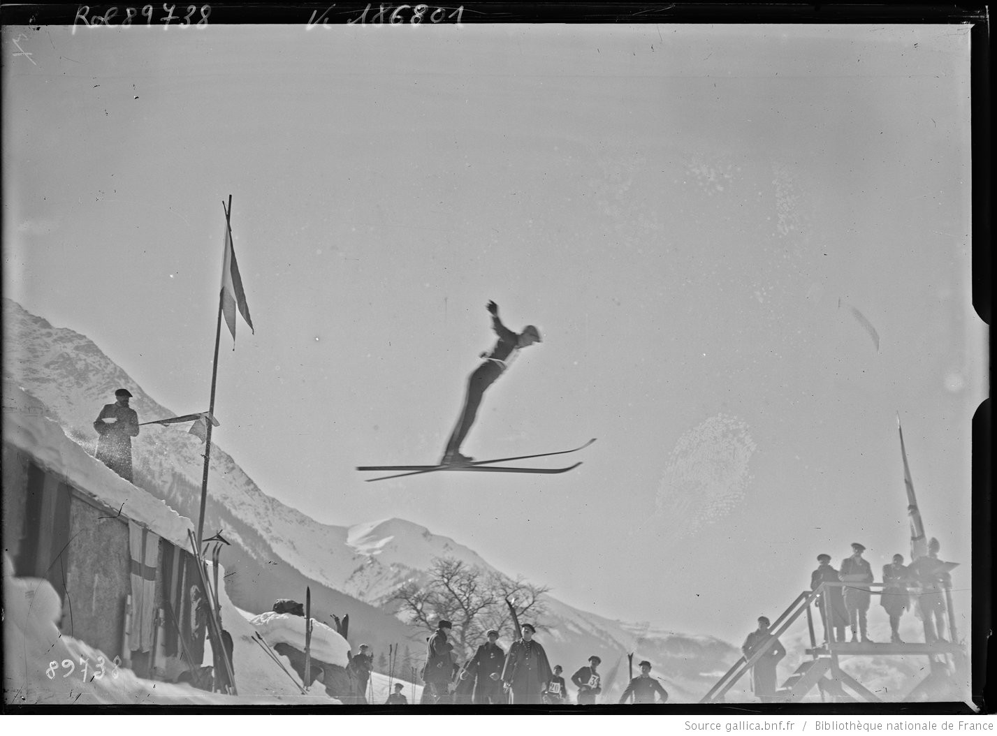 Chamonix, 4/2/24, Okern (Norvège) [4e de l'épreuve du combiné nordique, saut à ski] : [photographie de presse] / [Agence Rol]